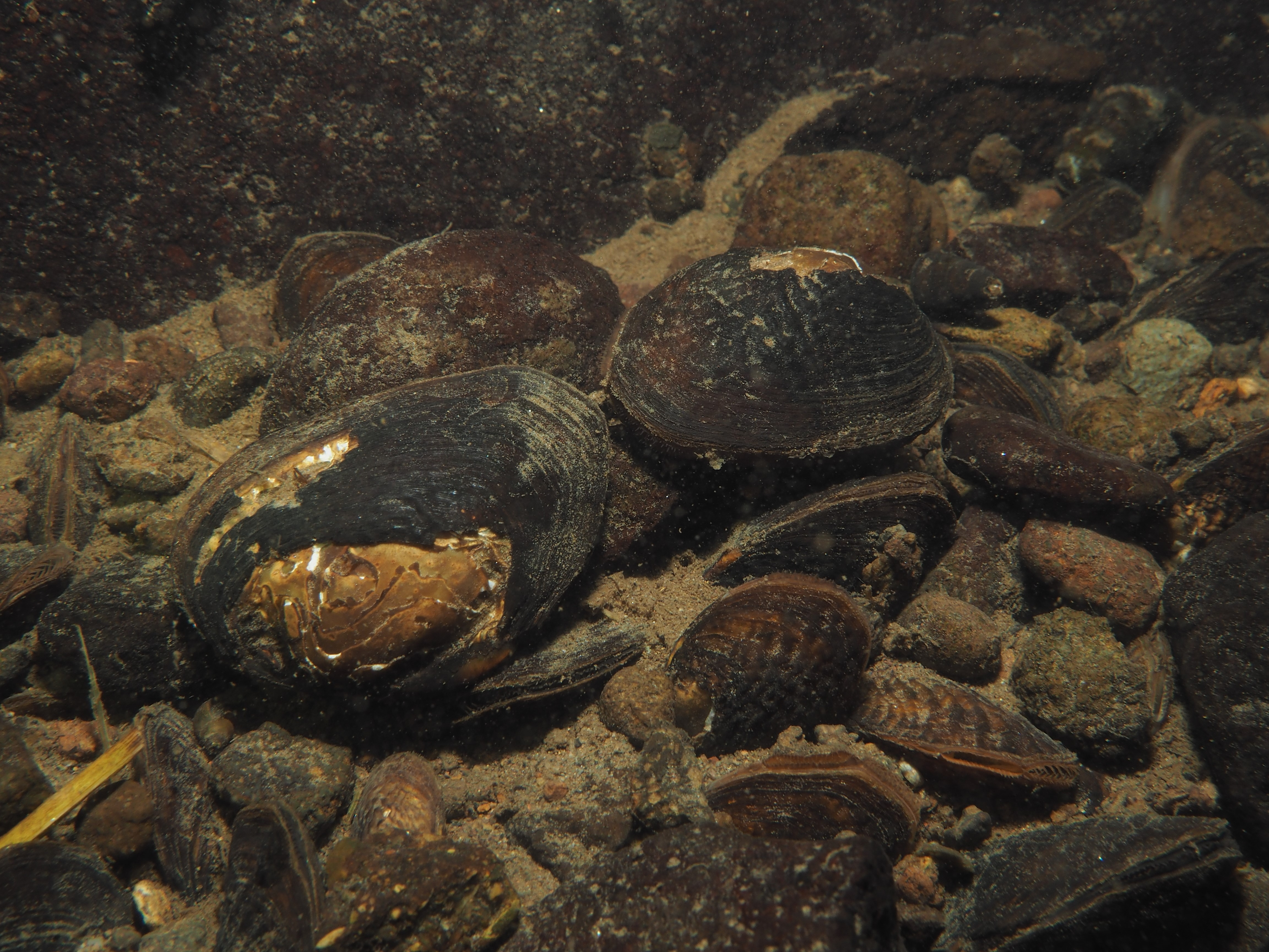 流心に群れるマツカサガイ（福岡県） 詳細